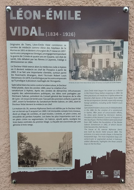 Léon Émile Vidal (1834-1926) Originaire de Trans, Léon Émile Vidal commence sa carrière de médecin comme élève des Hôpitaux de la marine en 1851 jusqu'à devenir chirurgien de 2e classe en 1857. Après une campagne au Sénégal, un engagement pendant la guerre de Crimée et quatre ans en Guyane, son état de santé, très délabré par les fièvres à Cayenne, l'oblige à démissionner en 1864. Le Docteur Vidal exerce alors la médecine civile à Hyères où il devient médecin en chef de l'hospice à partir de 1865. Il se fait une importante clientèle, surtout parmi les hivernants étrangers, dont l'écrivain Robert Louis Stevenson.. En 1879, il se distingue par les soins empressés qu'il prodigue à plusieurs naufragés de l'Arrogante. Spécialisé dans les soins contre la tuberculose, le Docteur Vidal plaide, dans les années 1880, pour la création d'un sanatorium à Hyères. Après des années de démarches infructueuses auprès des administrations publiques, ses idées sont partagées par Hermann Sabran, président du Conseil général des hospices de la ville de Lyon. Un essai est tenté avec l'accueil des premiers enfants à partir de 1887, avant la fondation du Sanatorium Renée Sabran, en 1892, dont le Docteur Vidal devient le médecin en chef. La maison du 39 avenue Alphonse Denis est édifiée par le Docteur Vidal sur un terrain qu'il acquiert en 1869. Cet immeuble compte trois niveaux, dont un étage de combles, et sept travées. L'entrée, en plein cintre, est encadrée de jambes harpées. Les baies les plus importantes sont à arc en plein cintre ou segmentaire. Un balcon souligne les trois baies centrale du premier étage. La façade est couronnée par une génoise à trois rangs.